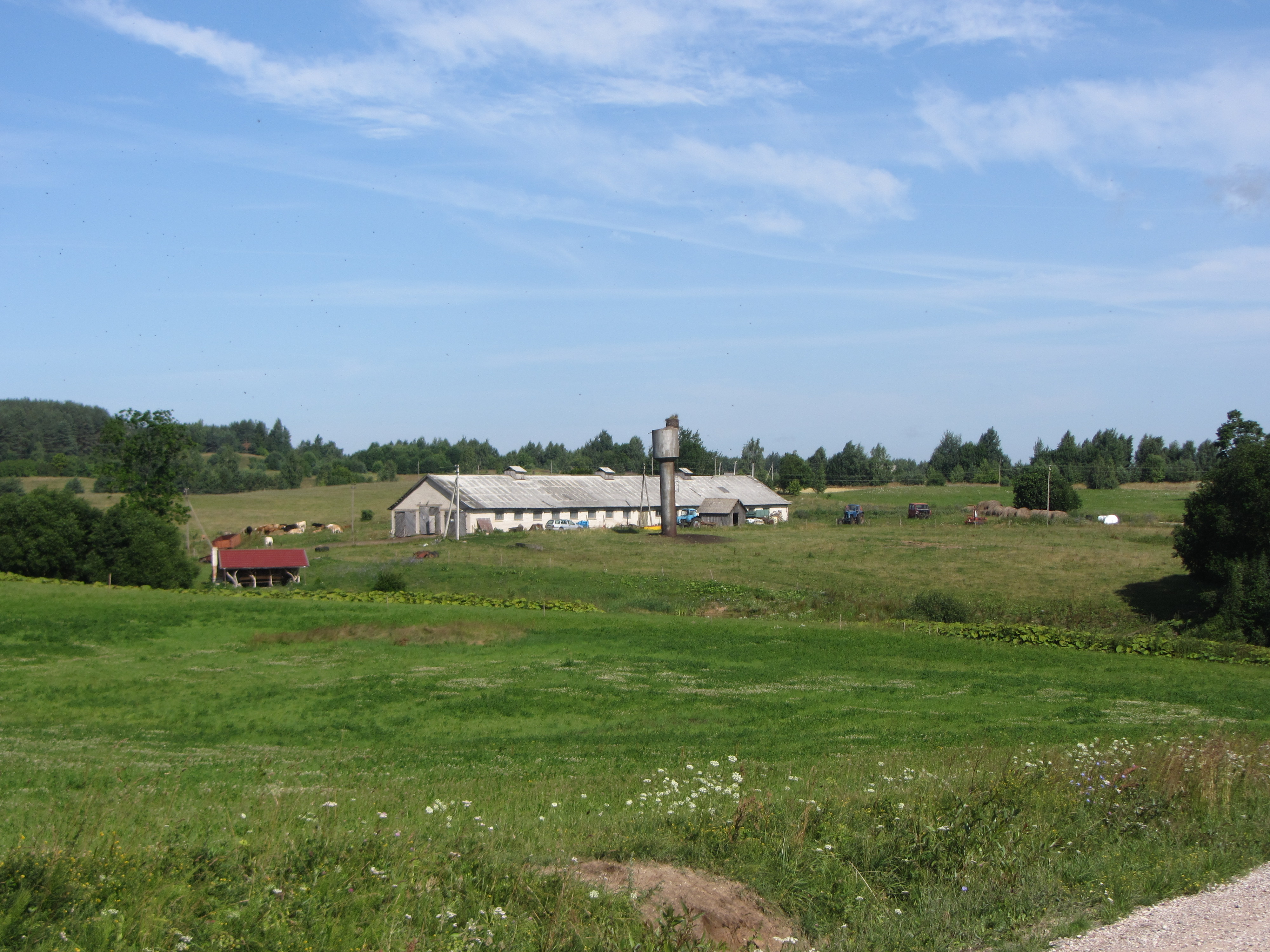 Kazokiškių sen., Lithuania